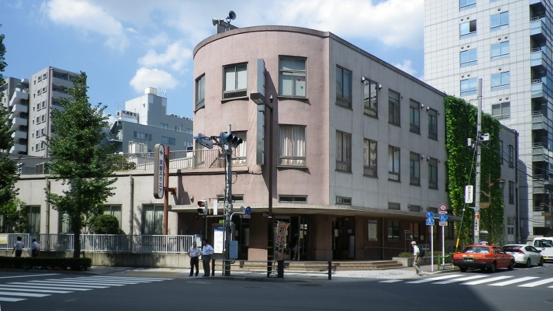 京華スクエア